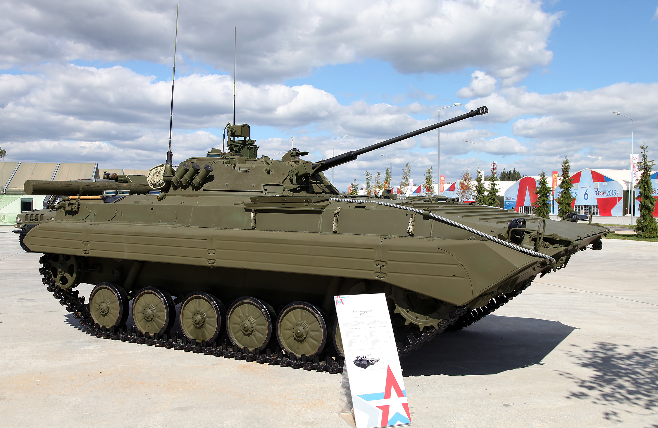 БМП-2 (BMP-2)